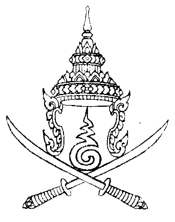 เครื่องหมายราชการกรมการรักษาดินแดน เป็นรูปพระมหามงกุฎคร่อมอุณาโลมและดาบไขว้ ภาพนี้มีฐานะเป็นเครื่องหมายราชการ กำหนดอยู่ในประกาศสำนักนายกรัฐมนตรี เรื่อง กำหนดภาพเครื่องหมายราชการ ตามพระราชบัญญัติเครื่องหมายราชการ พุทธศักราช ๒๔๘๒ (ฉบับที่ ๒๒) ลงวันที่ ๕ มกราคม พ.ศ. ๒๔๙๔ ประกาศในราชกิจจานุเบกษา เล่ม ๖๘ ตอนที่ ๗ วันที่ ๒๓ มกราคม พ.ศ. ๒๔๙๔ หน้า ๙๔-๙๕ หมายเหตุ: เครื่องหมายราชการนี้ถูกยกเลิกตามประกาศสำนักนายกรัฐมนตรี เรื่อง กำหนดภาพเครื่องหมายราชการ ตามพระราชบัญญัติเครื่องหมายราชการ พุทธศักราช ๒๔๘๒ (ฉบับที่ ๒๓๓) ลงวันที่ ๕ กันยายน พ.ศ. ๒๕๔๙ ประกาศในราชกิจจานุเบกษา เล่ม ๑๒๓ ตอนที่ ๑๐๖ ง วันที่ ๑๒ ตุลาคม พ.ศ. ๒๕๔๙ หน้า ๓ เนื่องจากได้ประกาศใช้ภาพเครื่องหมายราชการของหน่วยบัญชาการกำลังสำรอง กองทัพบก กระทรวงกลาโหม